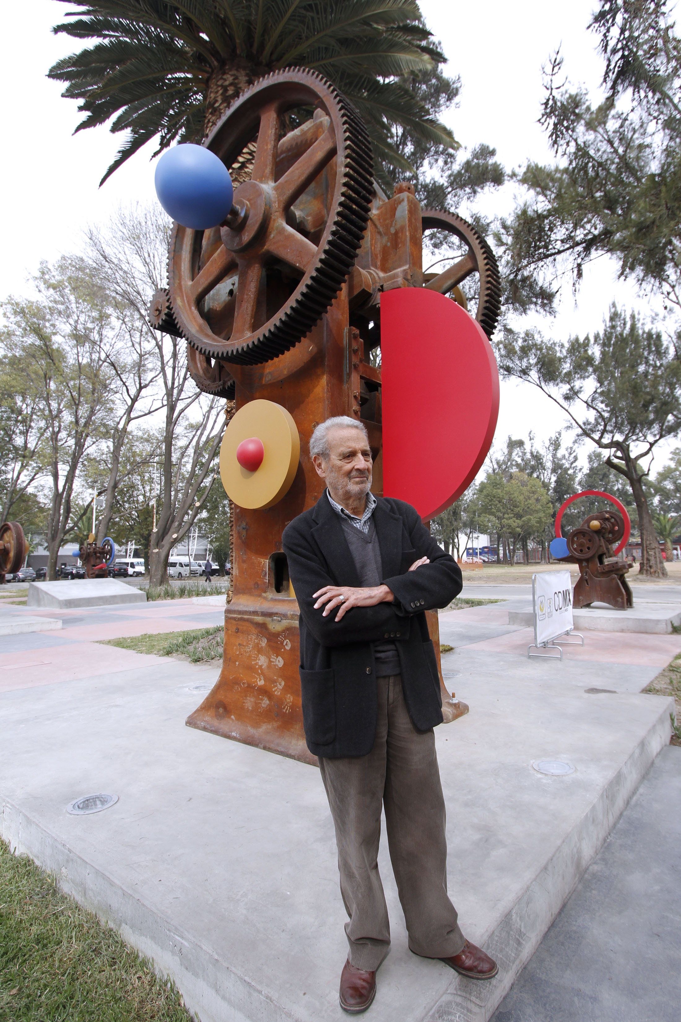 Martes, 22 de diciembre de 2015. En la ciudad deportiva de la Magdalena Mixhuca, se inauguró el Espacio Escultórico La Fábrica del artista plástico Vicente Rojo, acompañado del secretario de Cultura Eduardo Vázquez Martín, el titular de Indeporte, Horacio de la Vega, Felipe de Jesús Gutiérrez, secretario de Desarrollo Urbano y Vivienda, así como el presidente de Vasconia. Fotografía: Milton Martínez/Secretaría de Cultura CDMX.